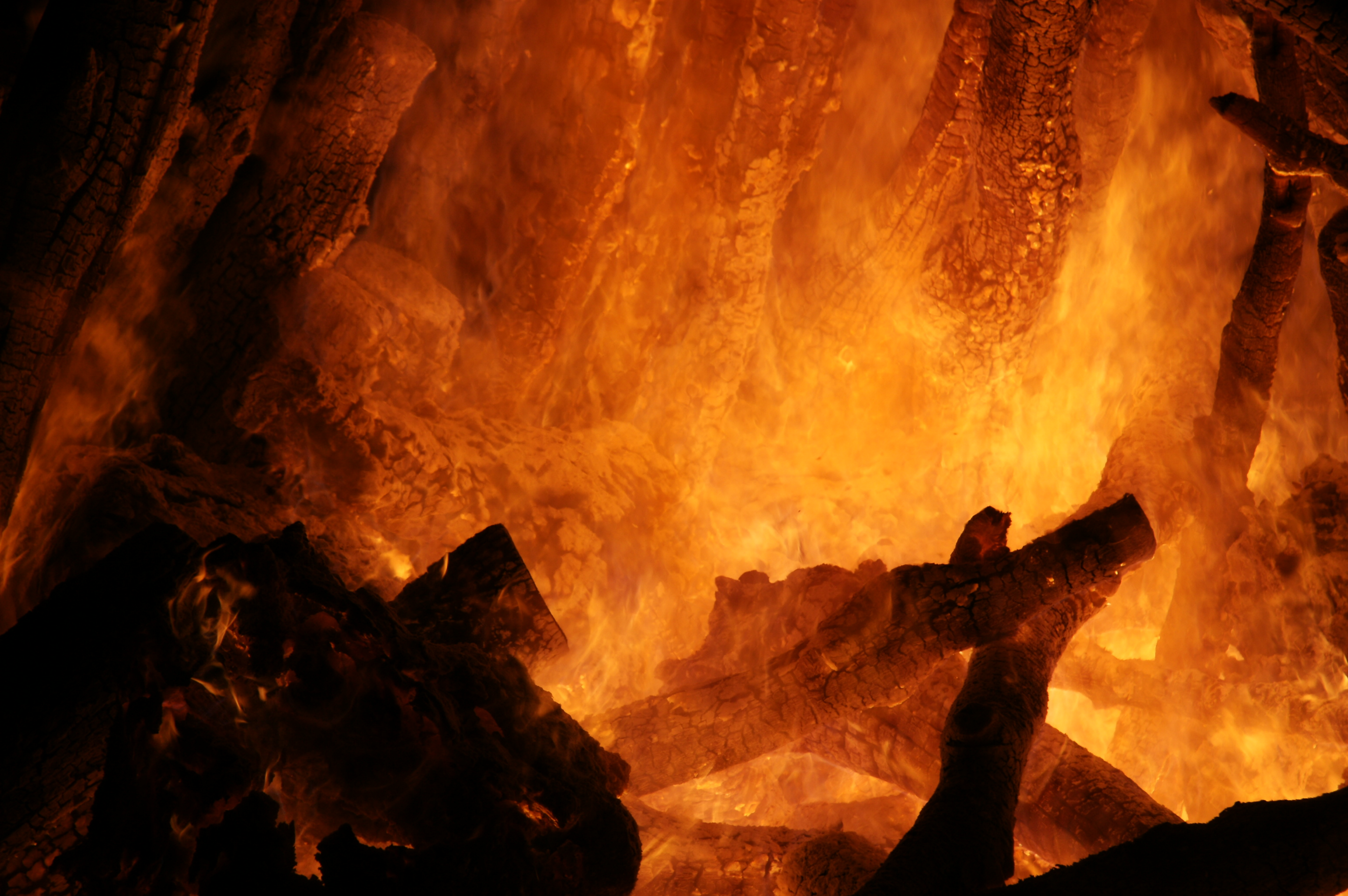 Pza de San Miguel Arcangel - Fresneda de la Sierra (Cuenca) Spain